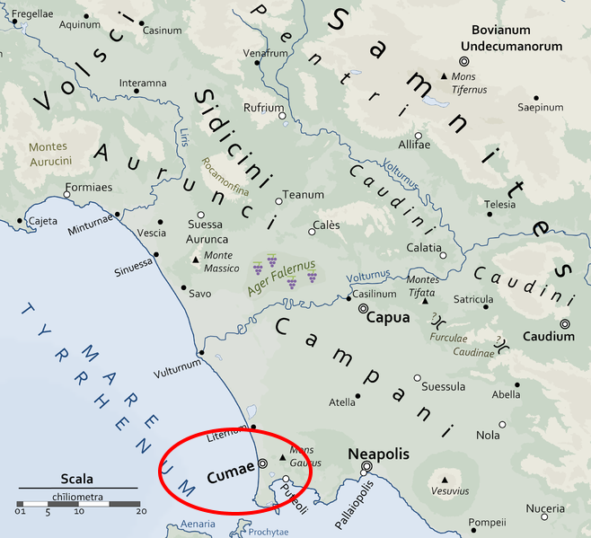 Carte du nord de la Campanie permettant de localiser le Roccamonfina, le Mont Tifata et le Vésuve ainsi que les villes de Suessa, Minturnae, Sinuessa, Casilinum et Capoue.